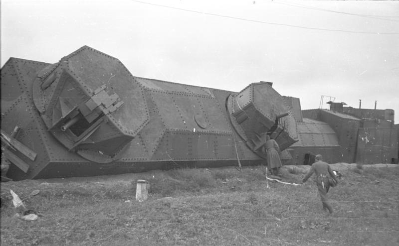 Vernichteter Panzerzug bei Potoki, 4.9.1941